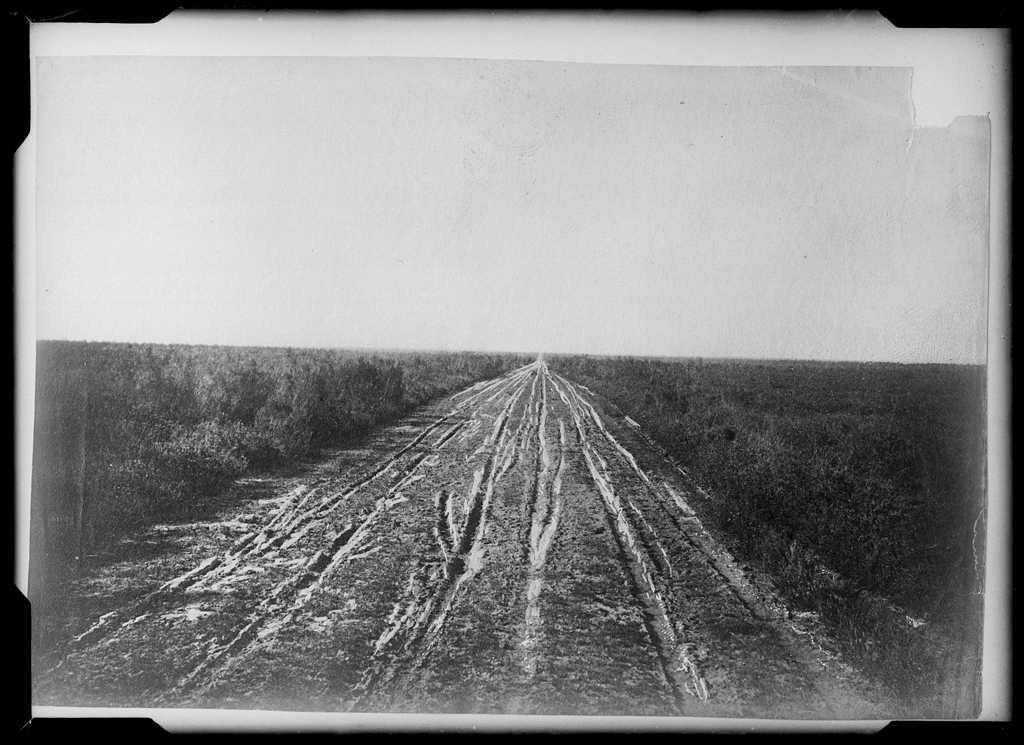 Reproduction numérique de l’œuvre Route d'Escourssole à Labouheyre réalisée par Félix Arnaudin à Labouheyre le 28 septembre 1880 selon la technique du gélatino bromure d'argent sur plaque de verre (13 x 18 cm).